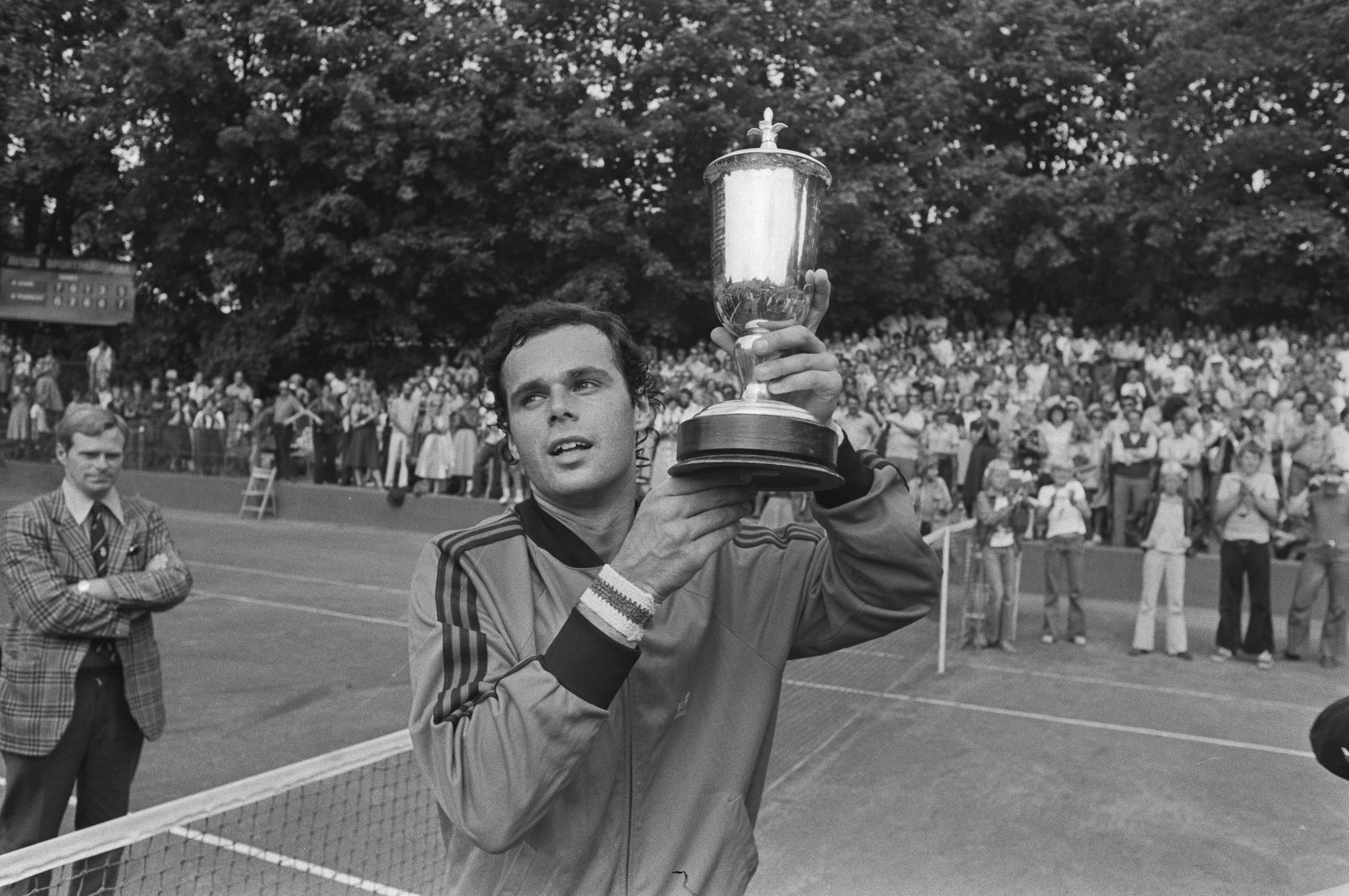 Collectie / Archief : Fotocollectie Anefo Reportage / Serie : [ onbekend ] Beschrijving : Internationale Tenniskampioenschap Melkhuisje (finale), Taroczy met de beker Datum : 18 juli 1976 Trefwoorden : tennis Instellingsnaam : Melkhuisje, 't Fotograaf : Verhoeff, Bert / Anefo Auteursrechthebbende : Nationaal Archief Materiaalsoort : Negatief (zwart/wit) Nummer archiefinventaris : bekijk toegang 2.24.01.05 Bestanddeelnummer : 928-6970